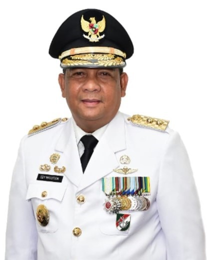 Wakil Gubernur Riau Edy Natar Nasution